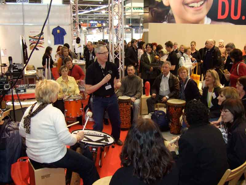 Drum circle bei der didacta 2008 in Stuttgart